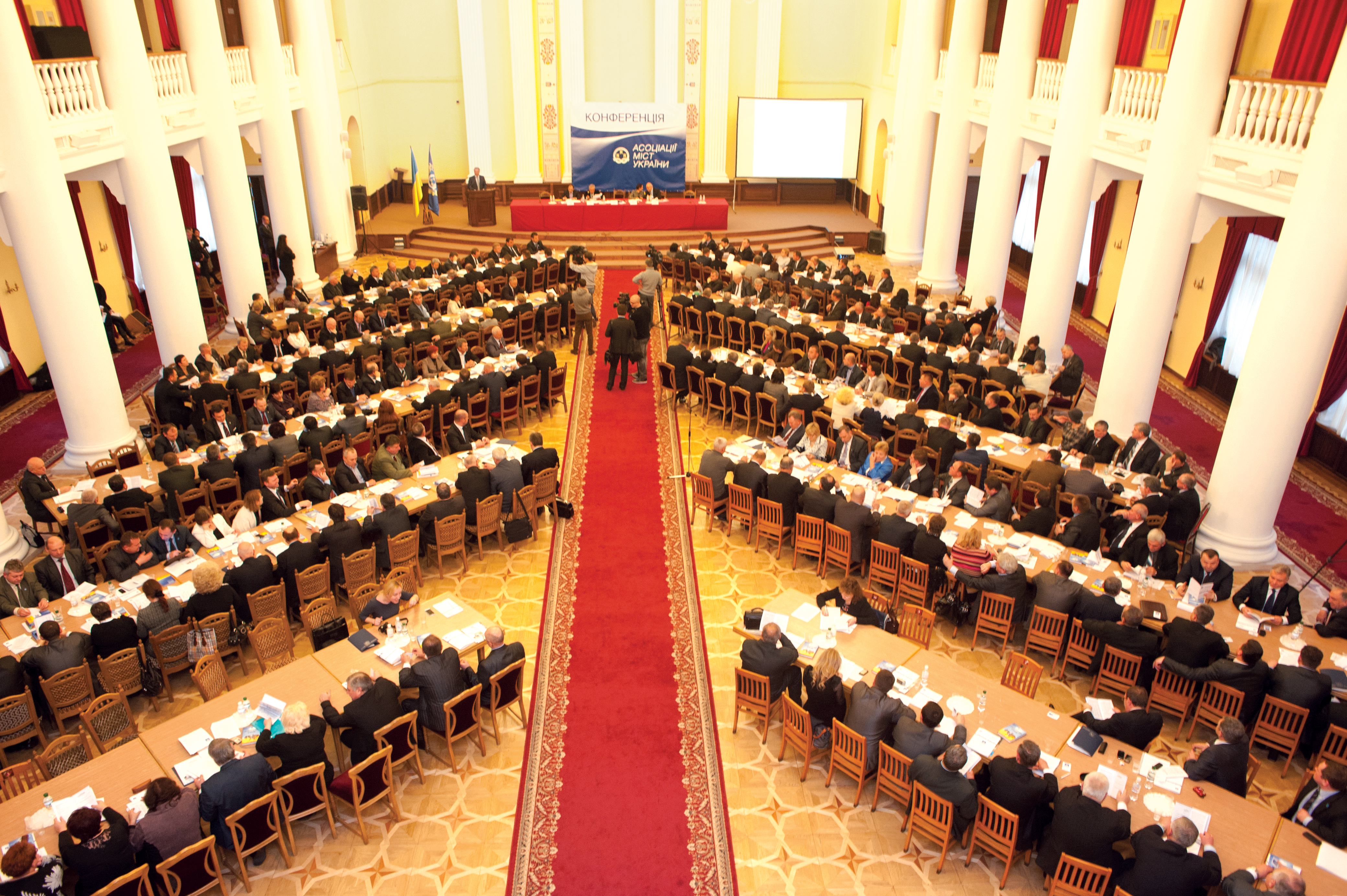 Асоціація міст України, Звітно-виборча конференція 4.12.2012 року